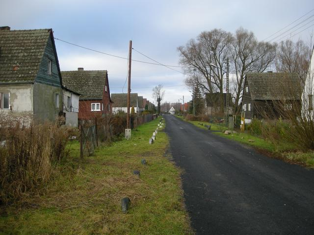 Osiedle przedwojennych domków jednorodzinnych, Szczecin, Wyspa Pucka ul. Flisacka